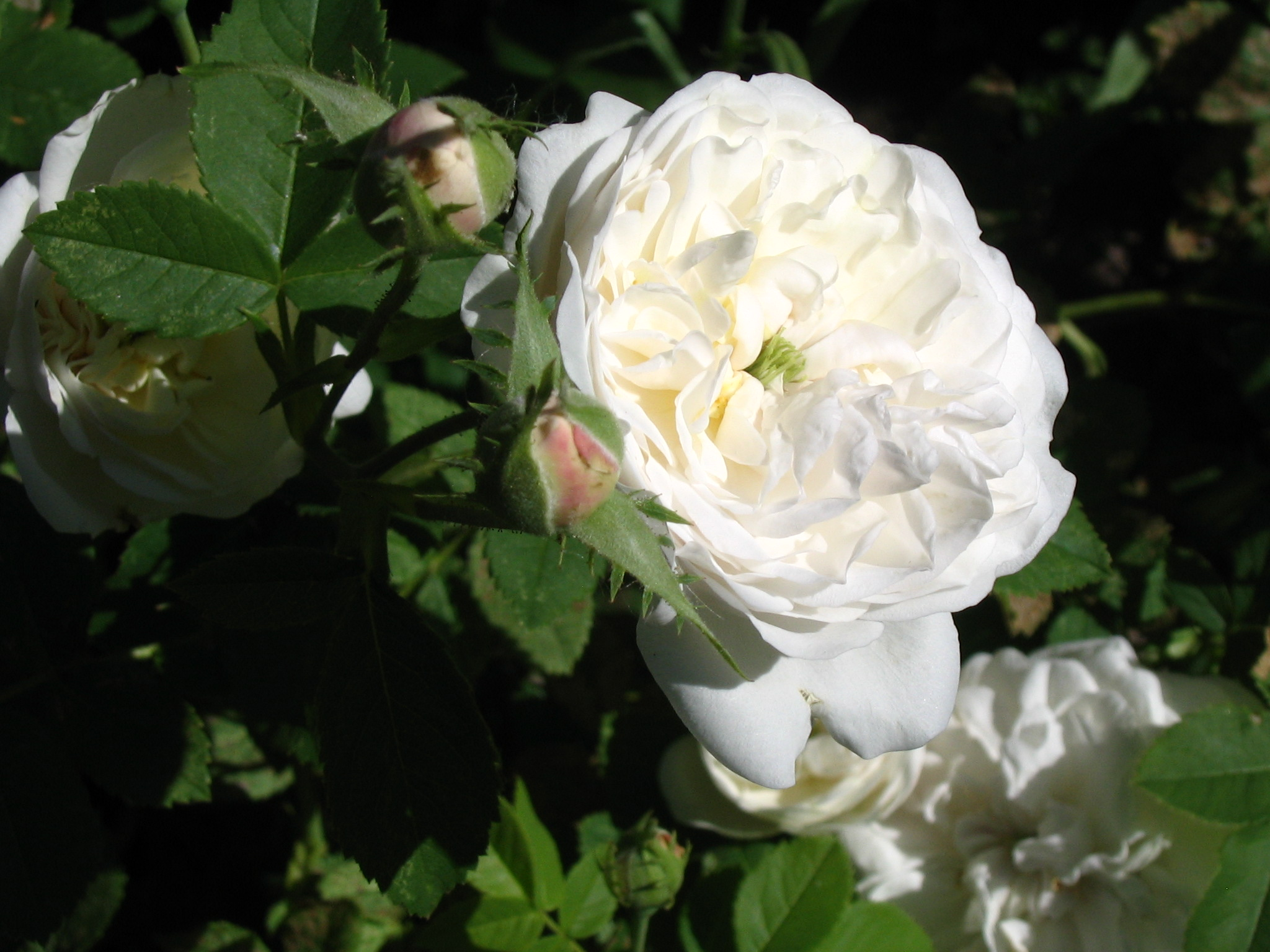 Rosa 'Mme Plantier'